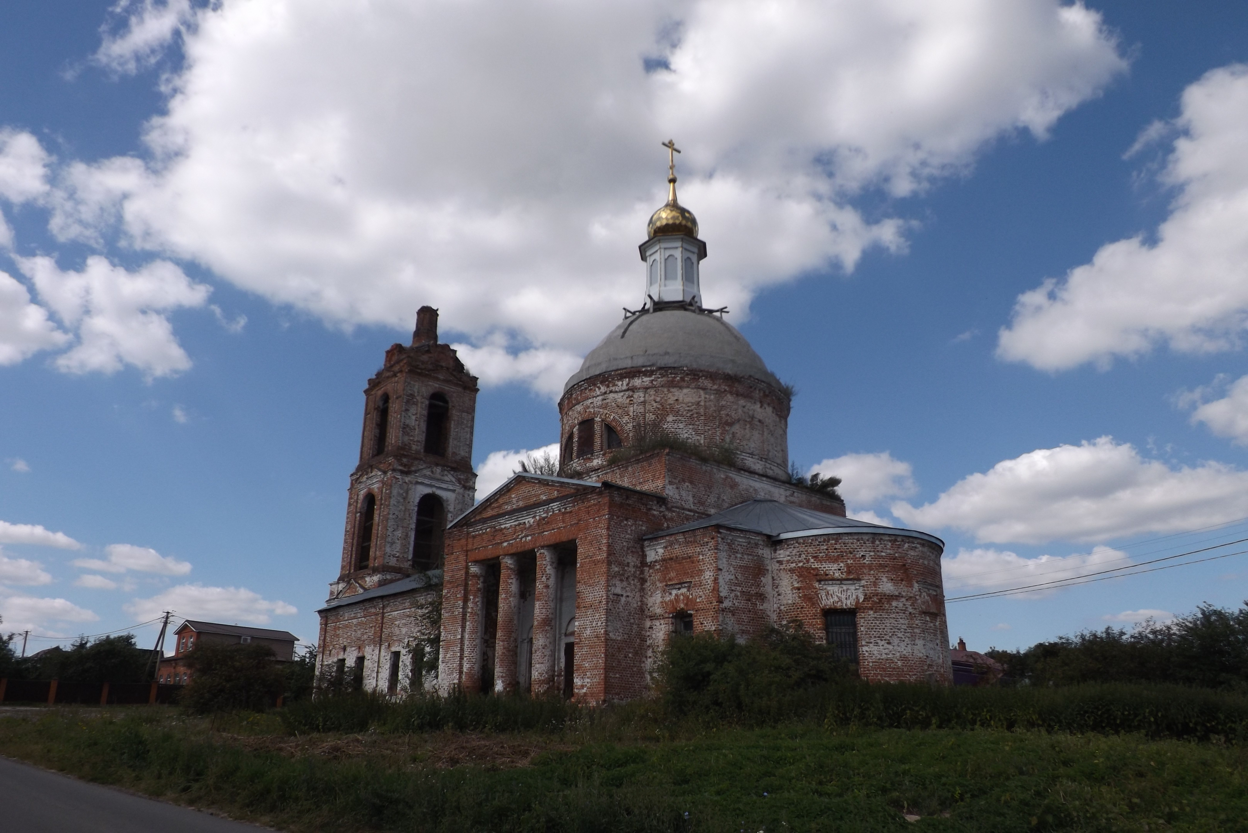 Церковь Ильи Пророка с колокольней: Васильково, Суздальский район, Владимирская область